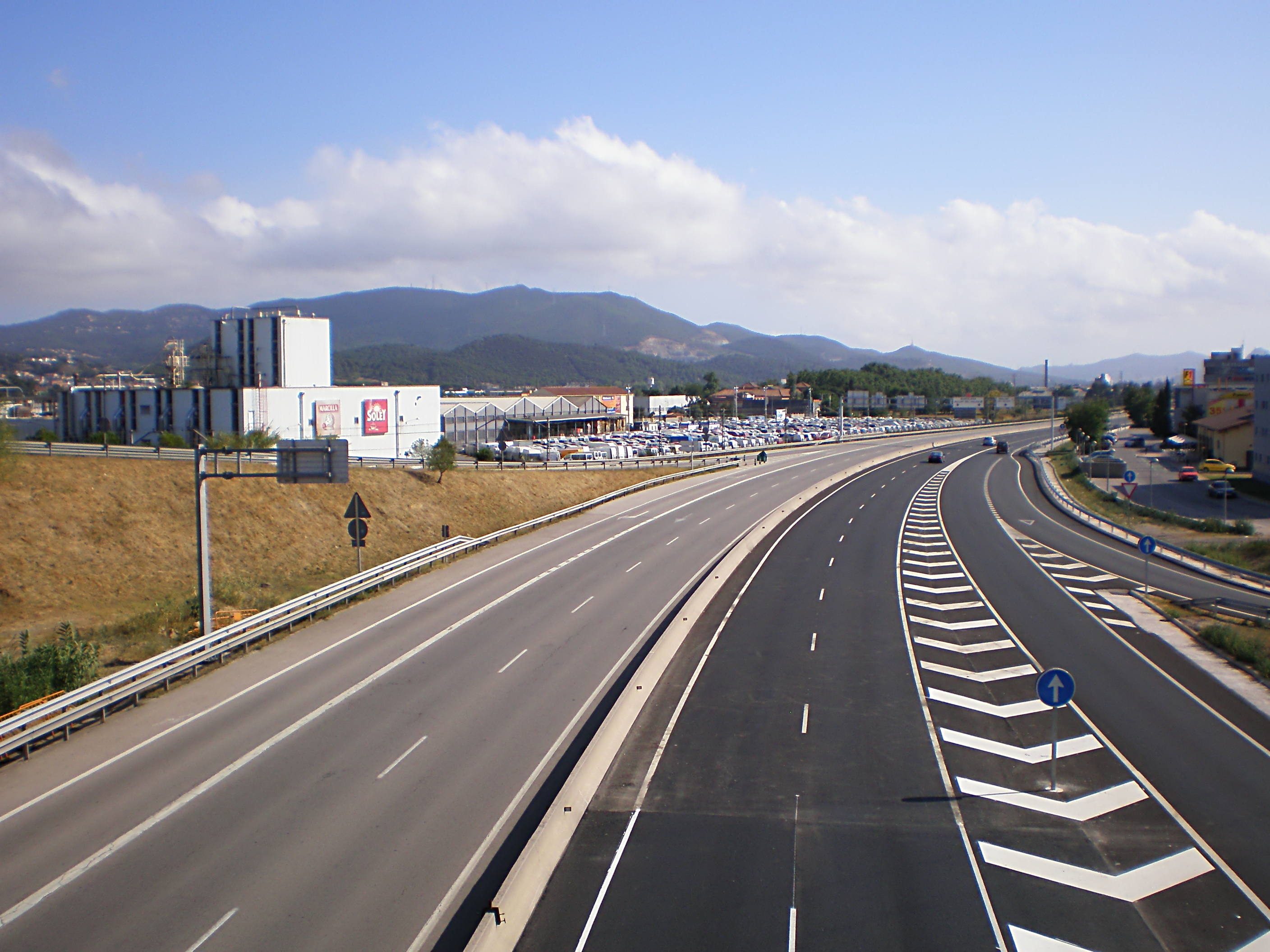 Autovía C-17 a su paso por Mollet del Vallès, vista desde el puente nuevo a Martorelles, mirando haci el Sur.